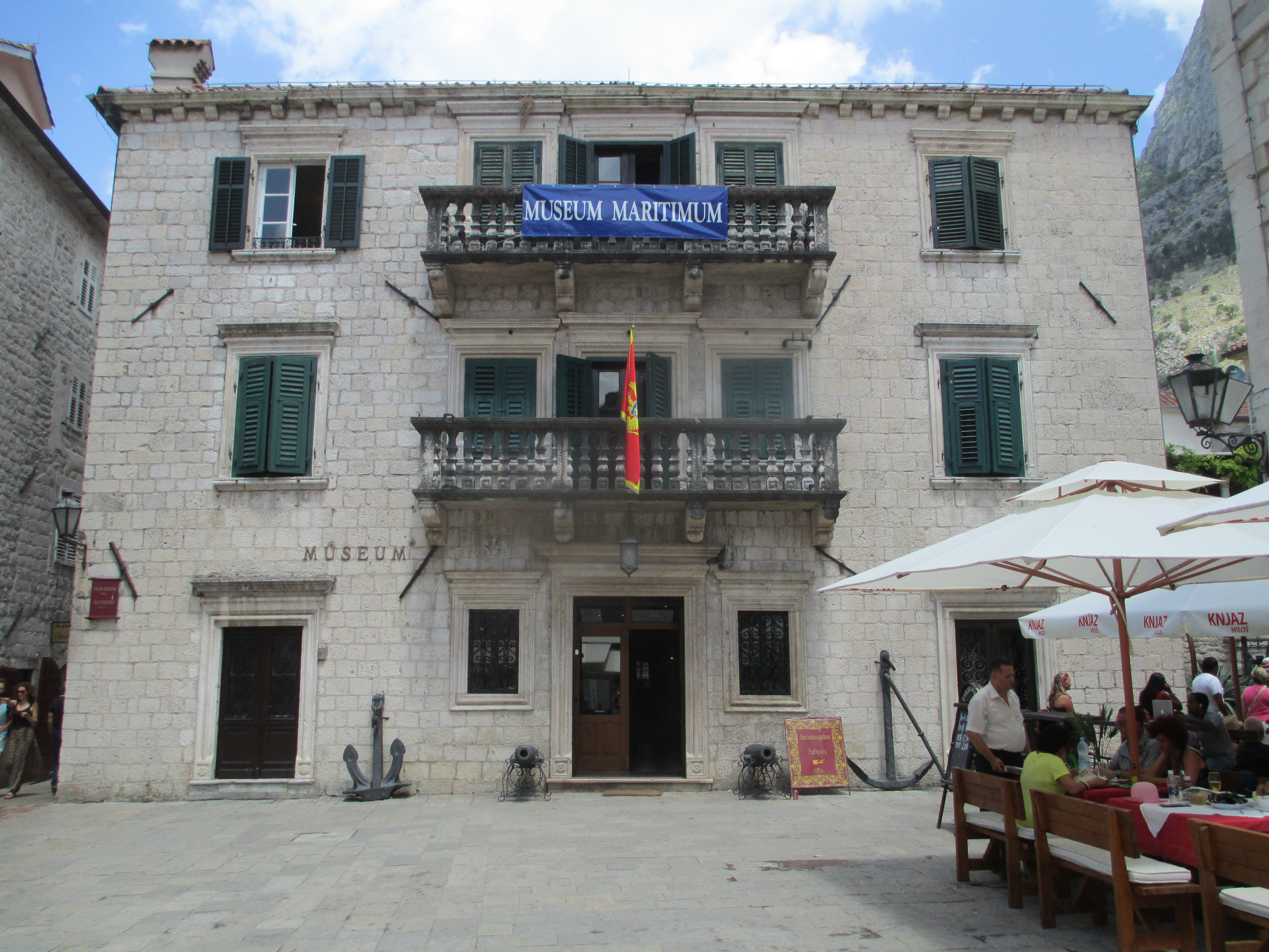 המוזיאון הימי בקוטור